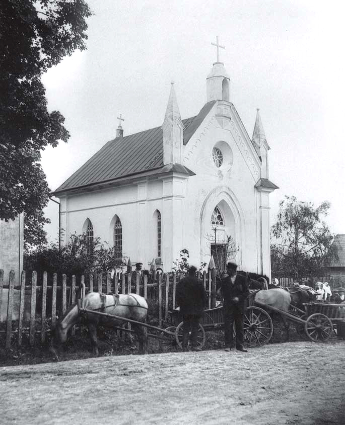 Беларуская (тарашкевіца): Вязань (Viazań). Касьцёл